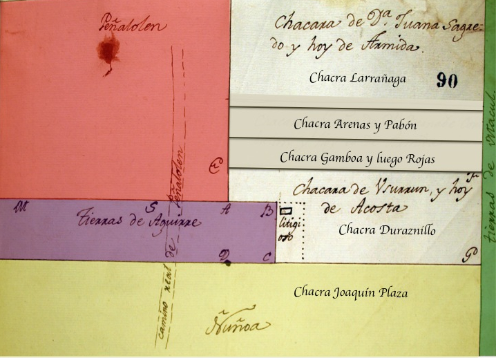 Esquema que muestra el origen de la hacienda de lo Hermida en el siglo XVIII.